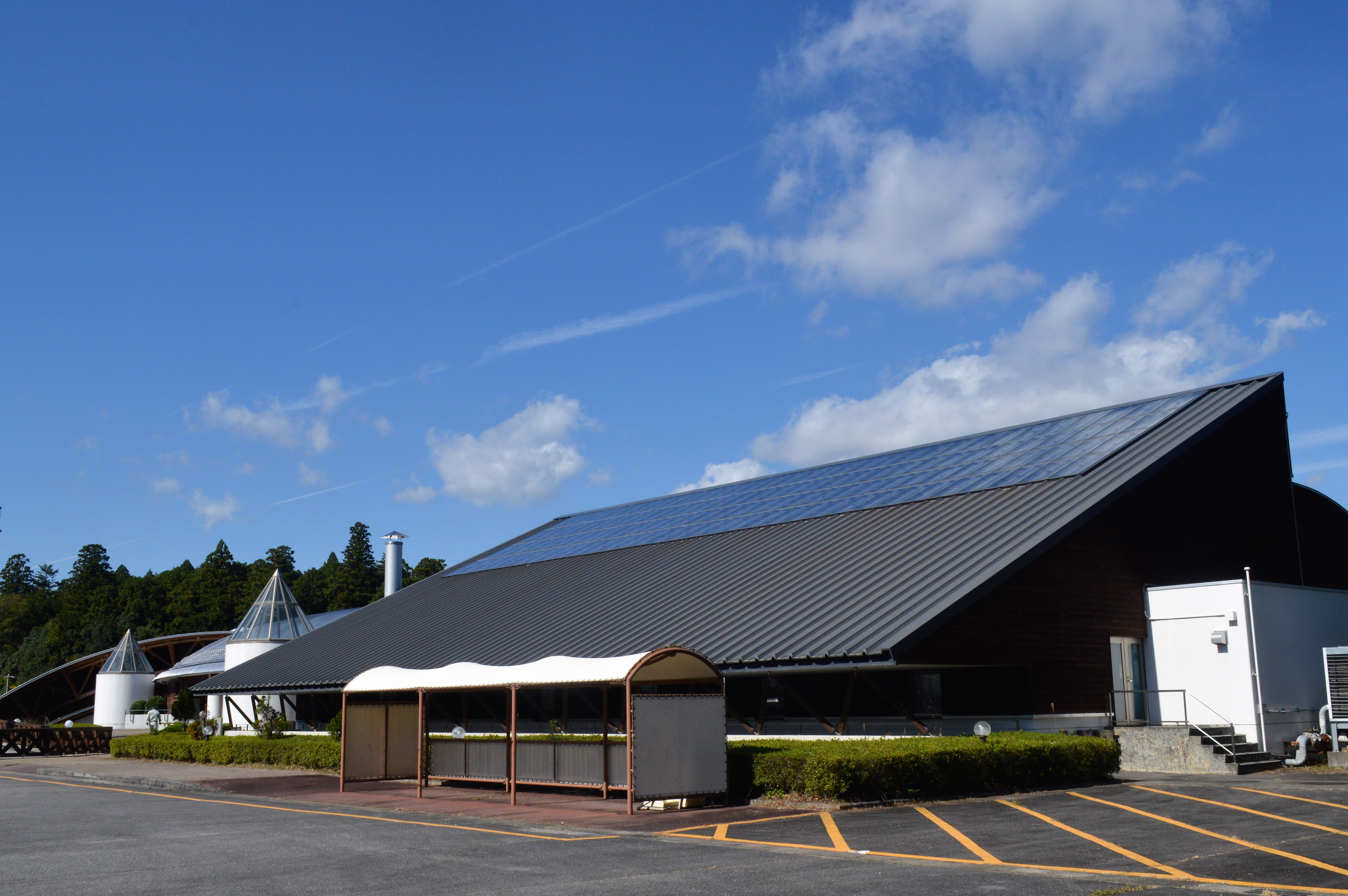 愛知県北設楽郡設楽町田口にある設楽町ふれあい広場。温水プールなど。